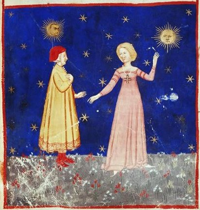 Dante, Divine Comédie: Rencontre de Dante et de Béatrice XIVe siècle. École vénitienne. Enluminure. Libreria Marciana, Venise. Dante suit Béatrice pour contempler les étoiles immobiles, merveilles de la création, dans la profondeur de l’amour divin.